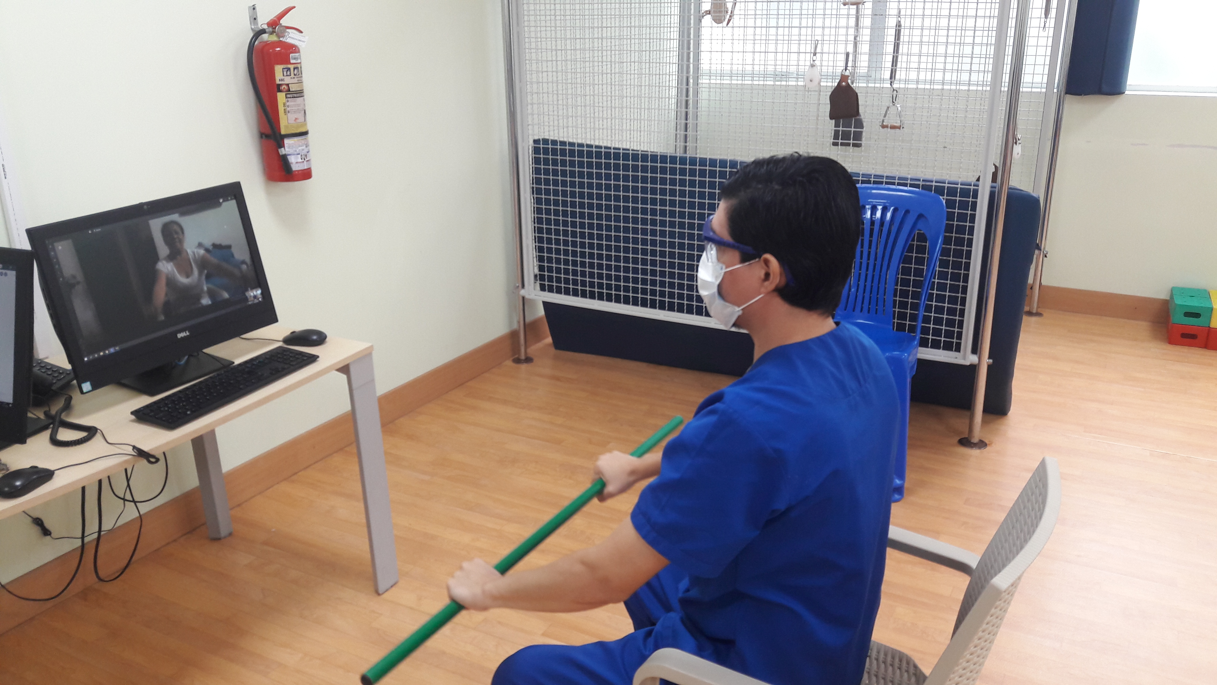 Teleconsulta